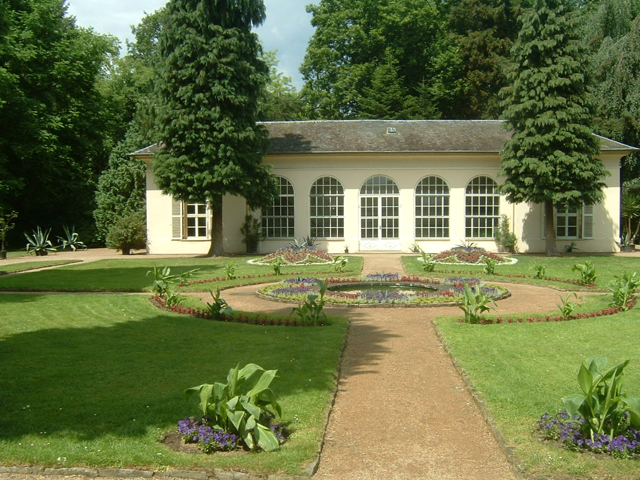 ehemalige Orangerie im Park Schönbusch in Aschaffenburg, später Gärtnerei, jetzt Teil des Informationszentrum